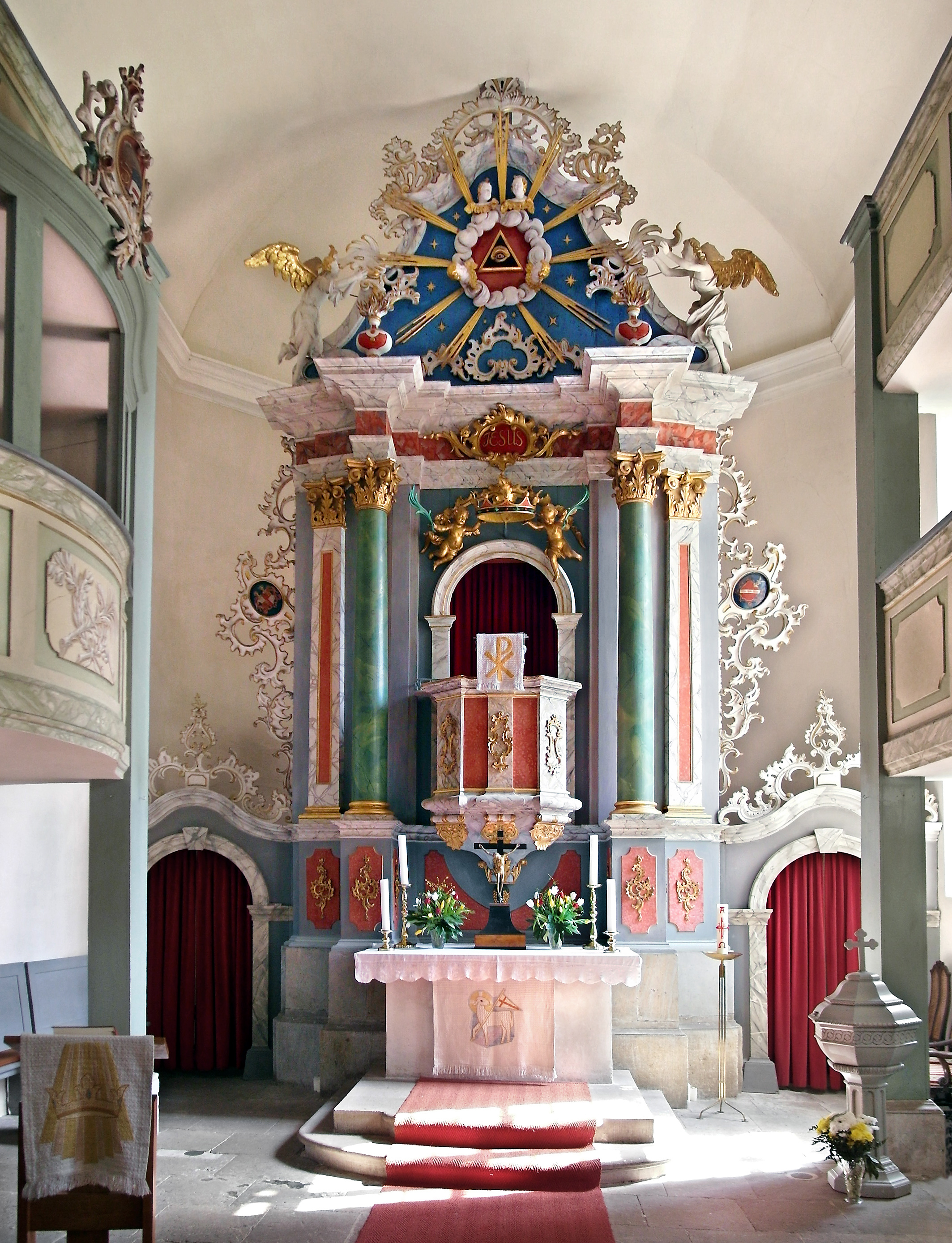 18.04.2016 01809 Burkhardswalde (Müglitztal): Die Kirche (GMP: 50.921267,13.858845) wurde erstmals 1444 erwähnt und um 1523 zu heutiger Größe erweitert. Bis 1865 war sie Begräbnisstätte der Familie von Bünau auf Schloß Weesenstein. Kircheninneres 1764 umfassend Spätbarock erneuert. Johann Daniel Ranft aus Geising schuf den Kanzelaltar. Der hölzerne Ädikula-Altaraufbau mit Säulen u. Pilastern ist farbig, teilweise mit Marmorierungen, gefaßt. [SAM4443.JPG]20160418105DR.JPG(c)Blobelt